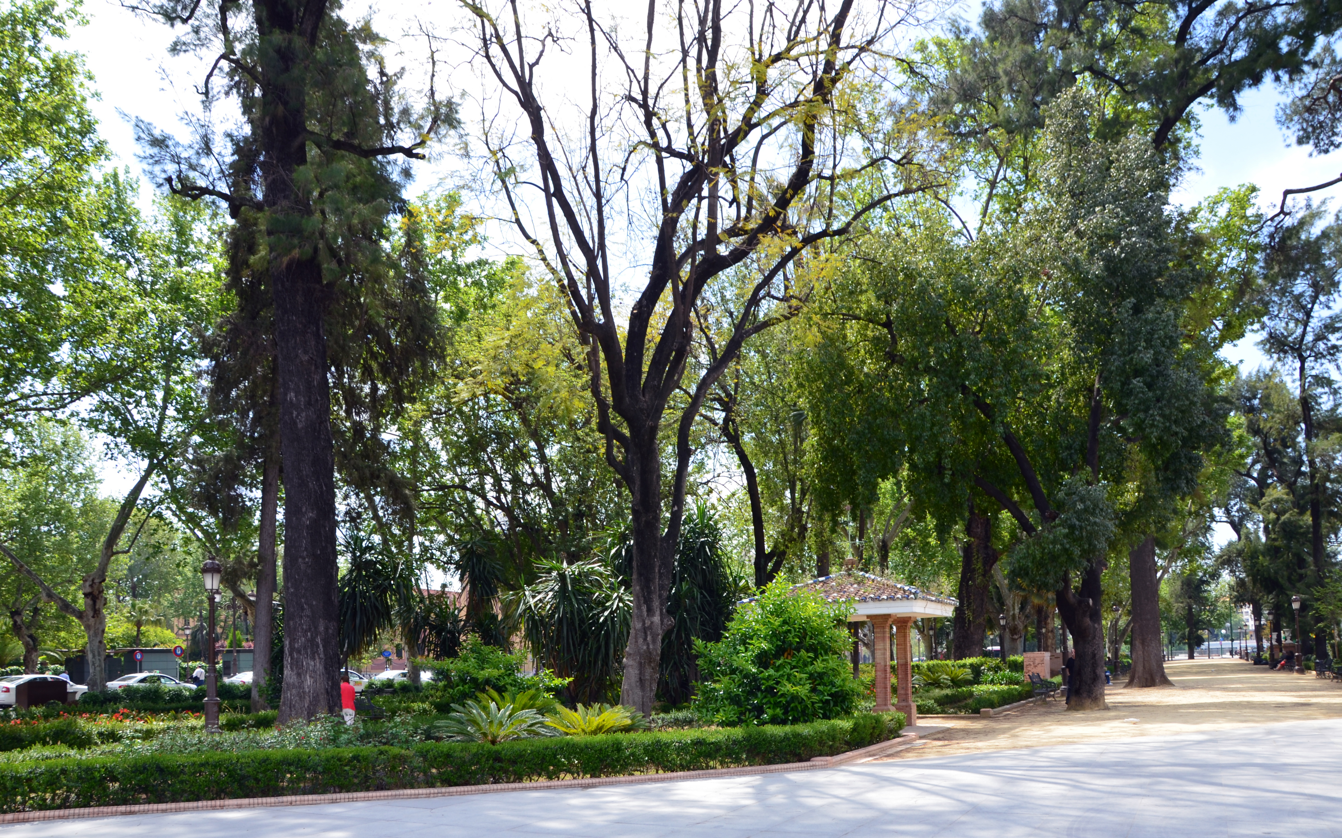 la promenade Vicente Aleixandre, à Séville (Espagne)